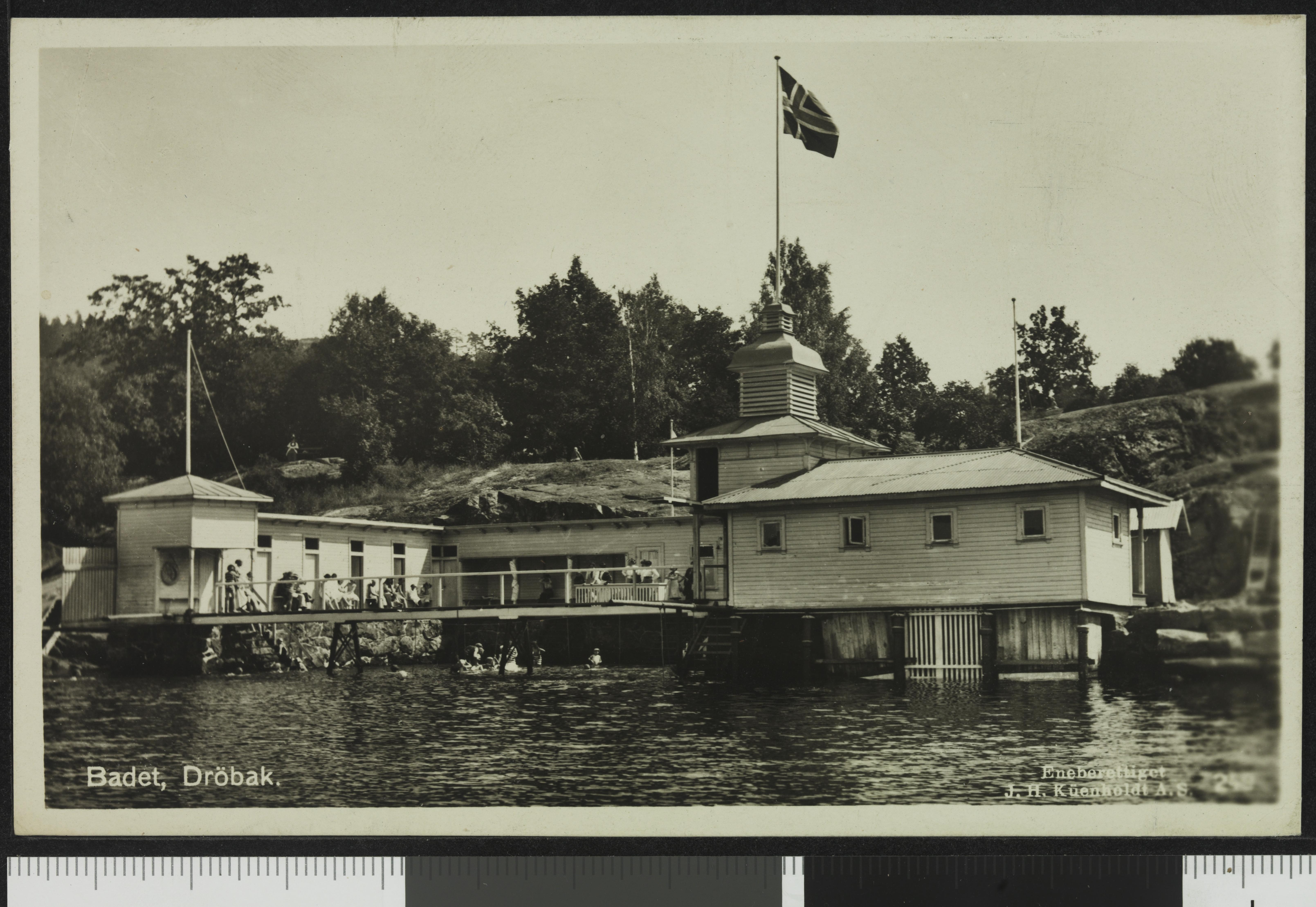 Bildet er hentet fra Nasjonalbibliotekets bildesamling Drøbak, Frogn, Akershus